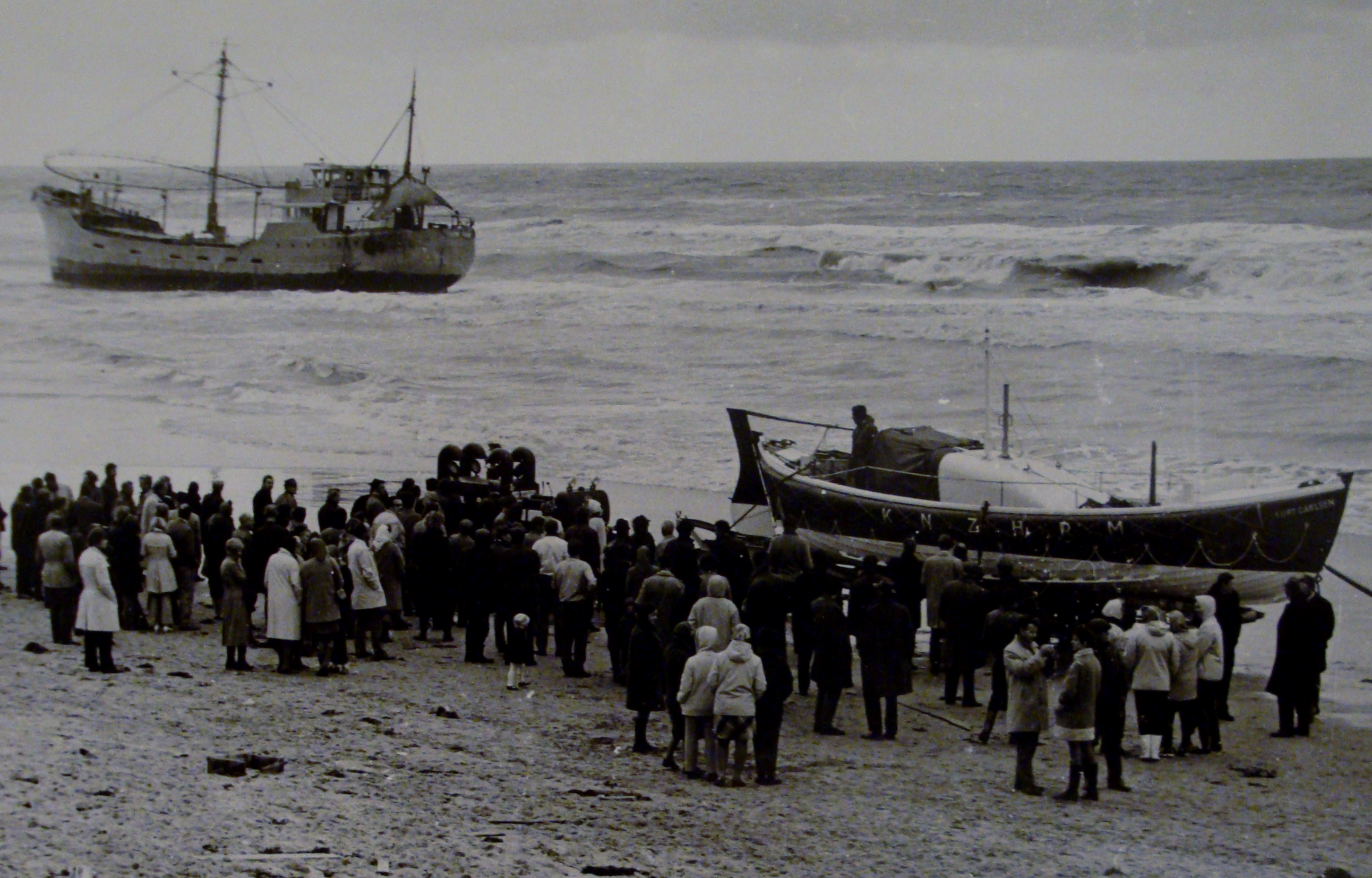 Zendschip King David (Radio Capitol), gestrand te Noordwijk aan Zee, ter hoogte van het toenmalige Palace Hotel. 11 november 1970